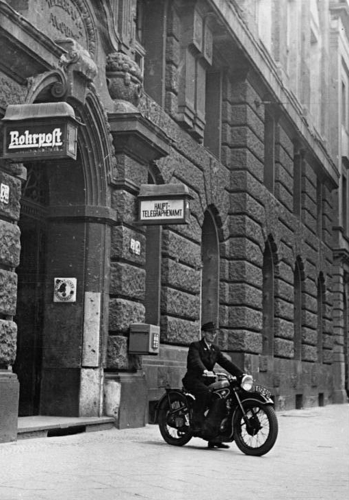 Berlin, Haupttelegrafenamt, Motorradbote 100 Jahre Haupttelegraphenamt Berlin. Am 16. August 1950 begeht das Haupttelegraphenamt in Berlin, Oranienburger-Str., sein 100 jähriges Jubiläum. Pioniertaten von weltgeschichtlicher Bedeutung gehen der Geburtsstunde des Berliner Haupttelegraphenamtes voraus und schufen erst diese technisch-hochentwickelte Nachrichtenzentrum Europas. Der berühmte Mathematiker und Physiker Carl Friedrich Gauß (1777-1855) erfand zusammen mit dem Physiker Wilhelm Weber (1804-1891) die elektrische Telegraphie. Im Jahre 1834 baute Gauß eine telegraphische Anlage, mit der zum ersten Male Zeichen durch elektrische Ströme übermittelt wurden. Werner von Siemens schuf später die Voraussetzung für die technische Weiterentwicklung der Telegraphie durch seine Erfingun des Guttaperchakabels. Heute bestehen modernste Einrichtungen im Berliner Haupttelegraphenamt. 13 Funk- und Drahtverbindungen wurden nach 1945 zwischen Berlin und dem Auslan wieder aufgenommen. Am 13. Juni 1950 wurde die Funkverbindung Berlin-Peking eröffnet. Die Steigerung der Augaben des Berliner Haupttelegraphenamtes und zugleich ein wichtiger Beitrag zur Herstellung der Einheit Deutschlands. UBz: Telegramme in die umgebende Bezirke des Haupttelegraphenamtes werden durch Kurier direkt dem Empfänger zugestellt. Aufn. Illus Sturm 19 S 99 696 Mü 7508-50 9.8.50 [Berlin.- Postbote auf BMW-Motorrad vor Haupttelegrafenamt, Schild "Rohrpost" neben Eingang"]